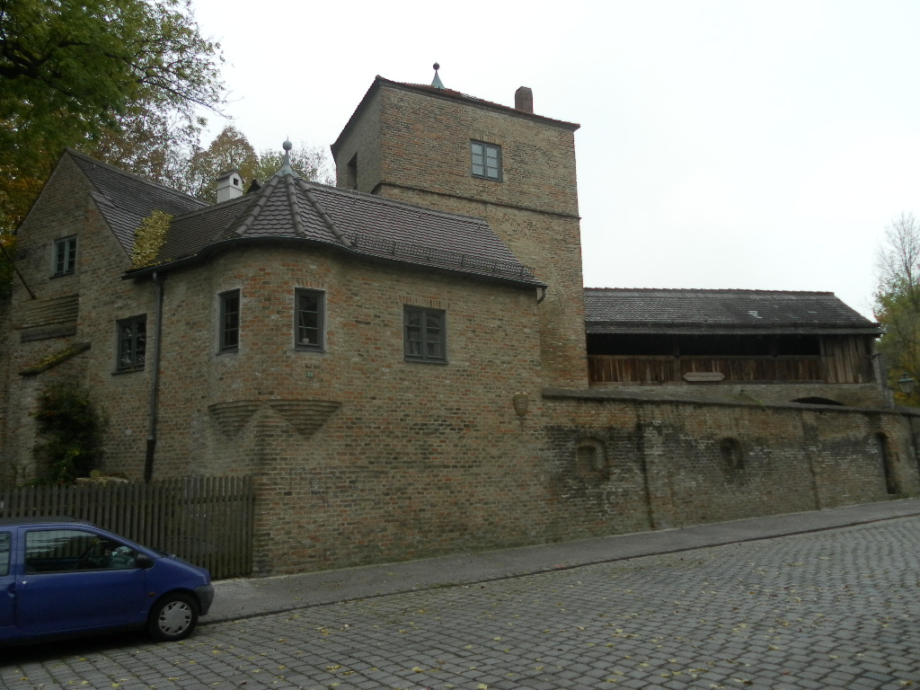 Der Jakoberwall am südöstlichen Rand der Jakobervorstadt